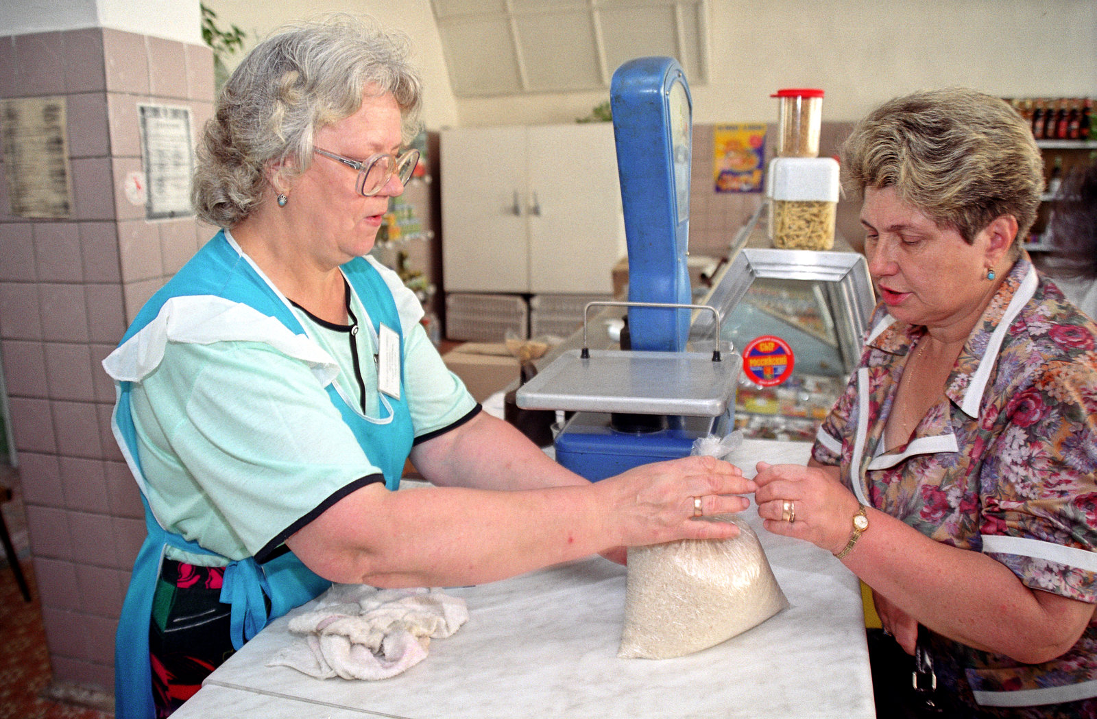 Магазин в правом крыле заводоуправления ОАО «Компания Славич», под столовой. Магазином владело управление рабочего снабжения (оно же отдел рабочей торговли). Слева продавщица Галина Алексеевна Никифорова, справа Галина Викторовна Расторгуева (сотрудник расчётного отдела бухгалтерии). Город Переславль-Залесский.